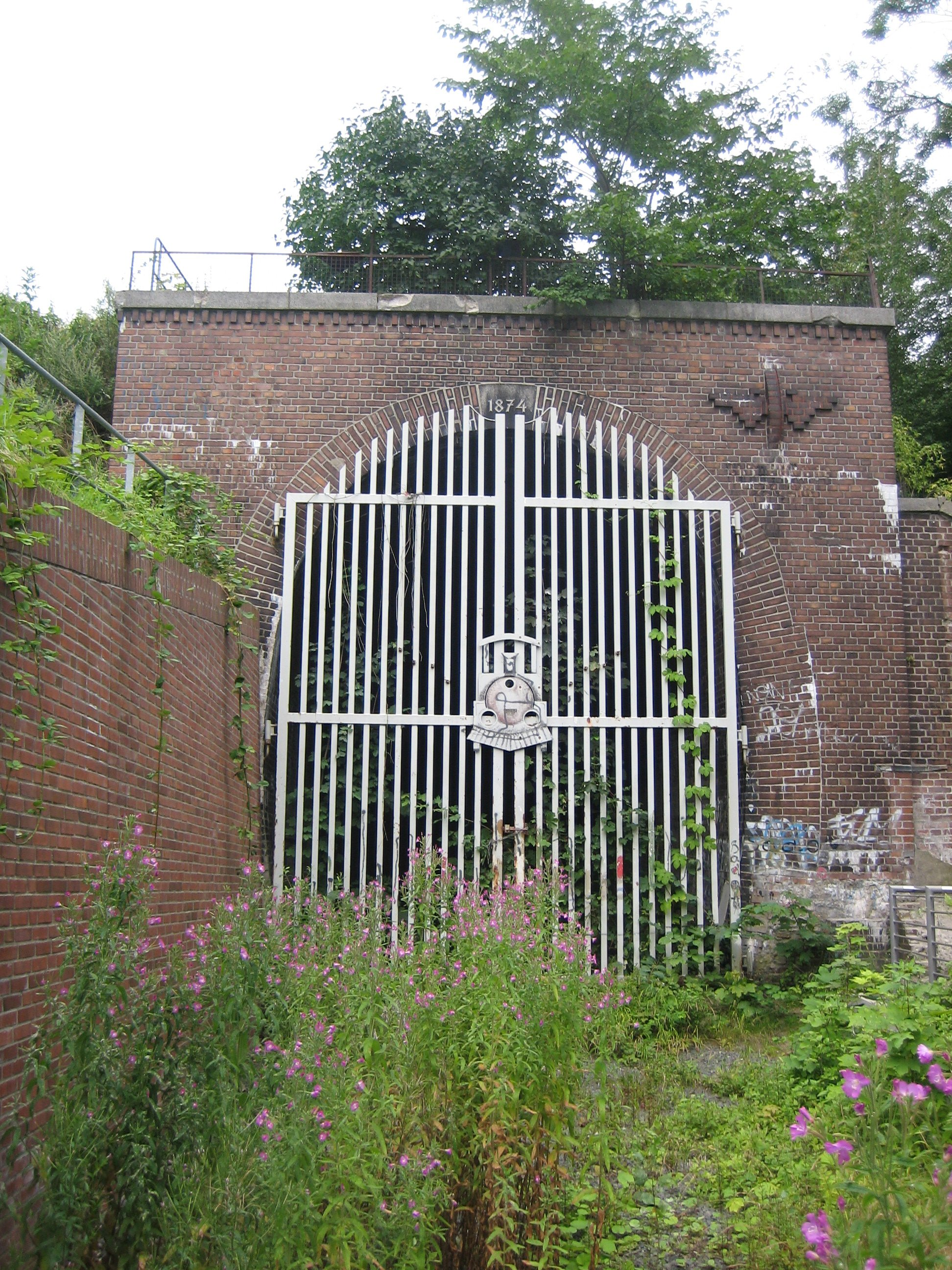 Südportal des Schellfischtunnels in Hamburg-Altona